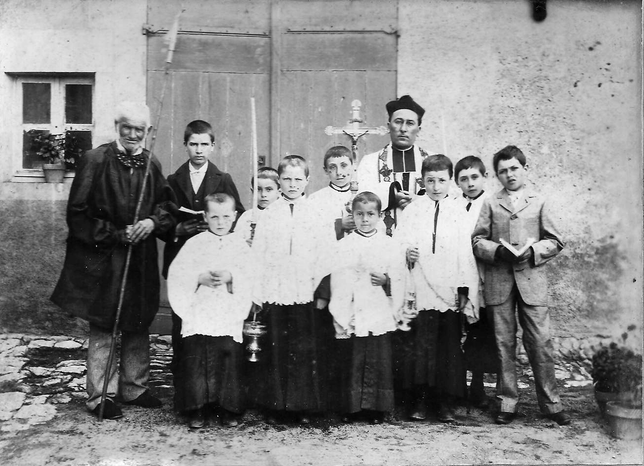 Enfants de chœur à Châteauneuf-Val-de-Bargis, Nièvre, en 1908 (Archives de la famille Terrasson).